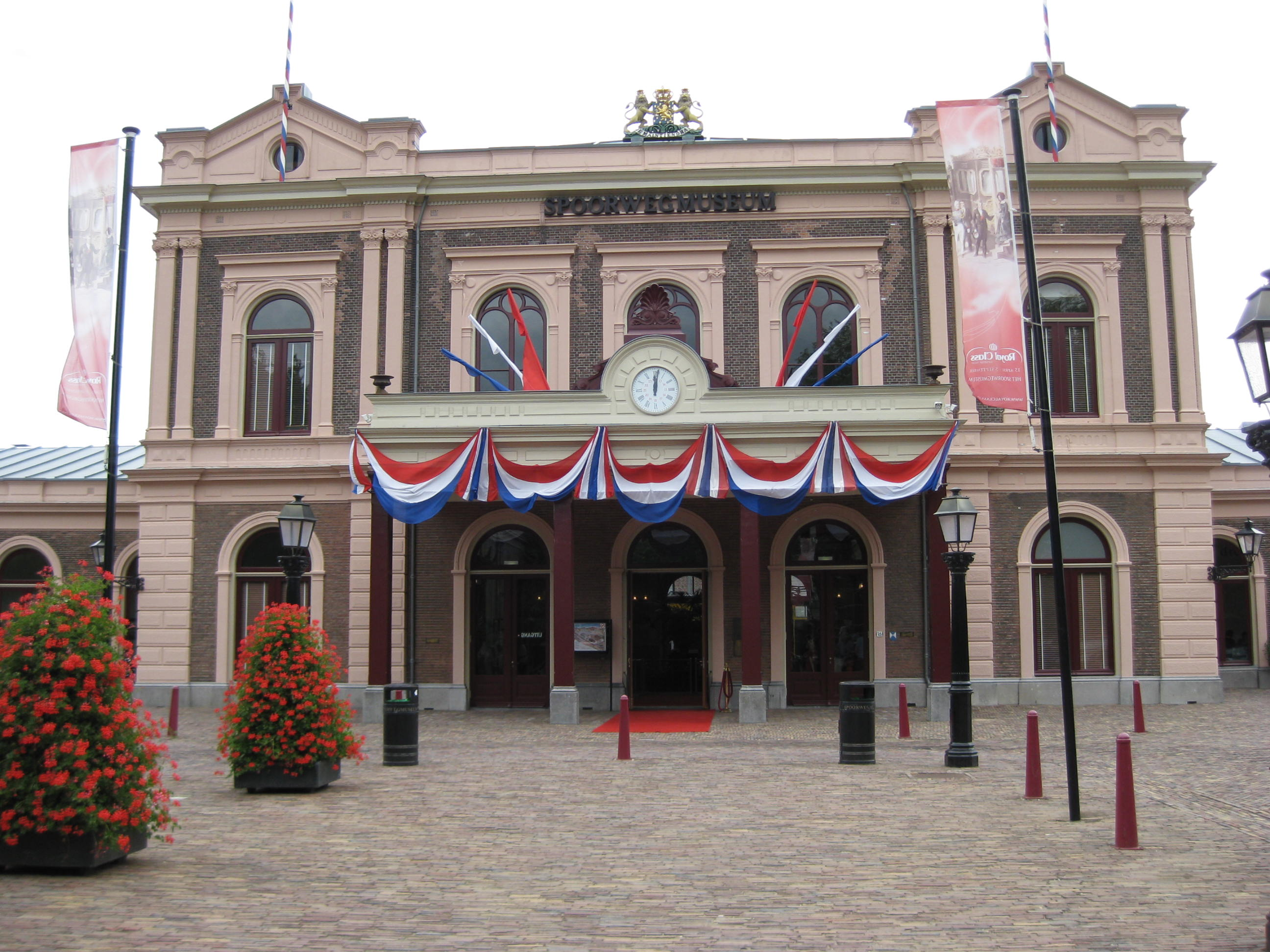 Spoorwegmuseum in Utrecht, Nederland